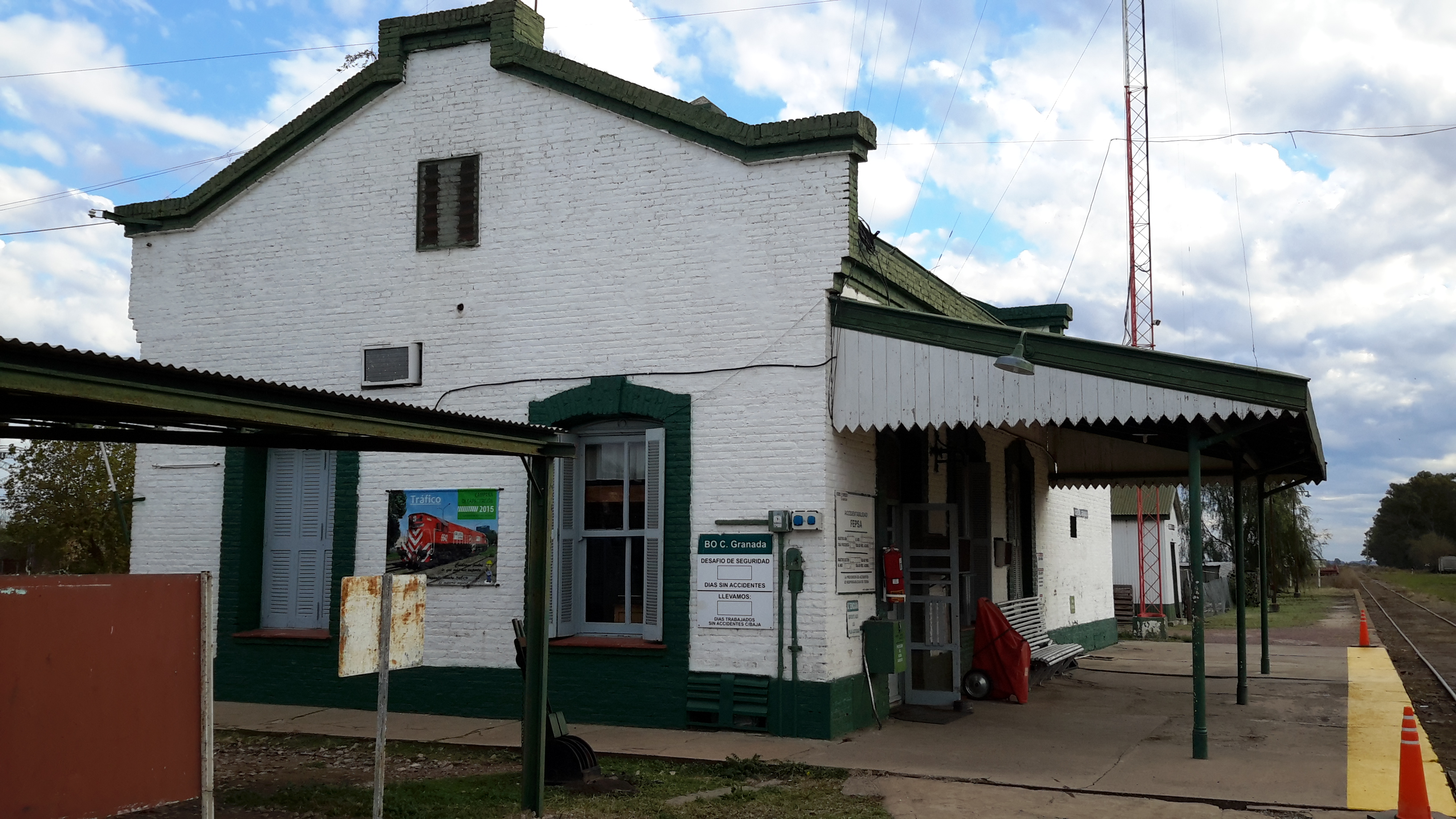 Ubicada en la localidad de Villa Francia, en el partido de partido de General Pinto, Provincia de Buenos Aires, República Argentina